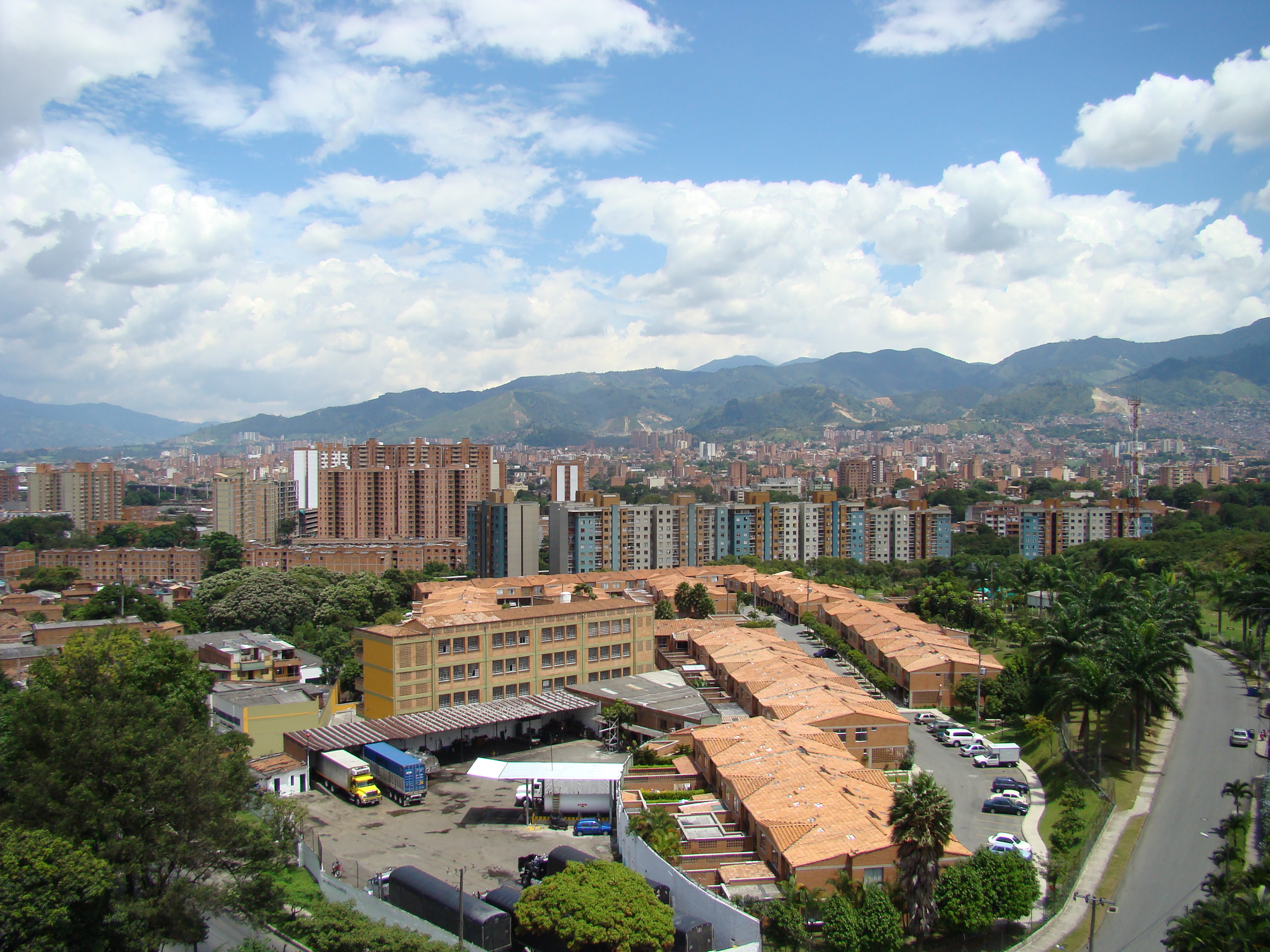 Sector Estadio, Medellín, Colombia